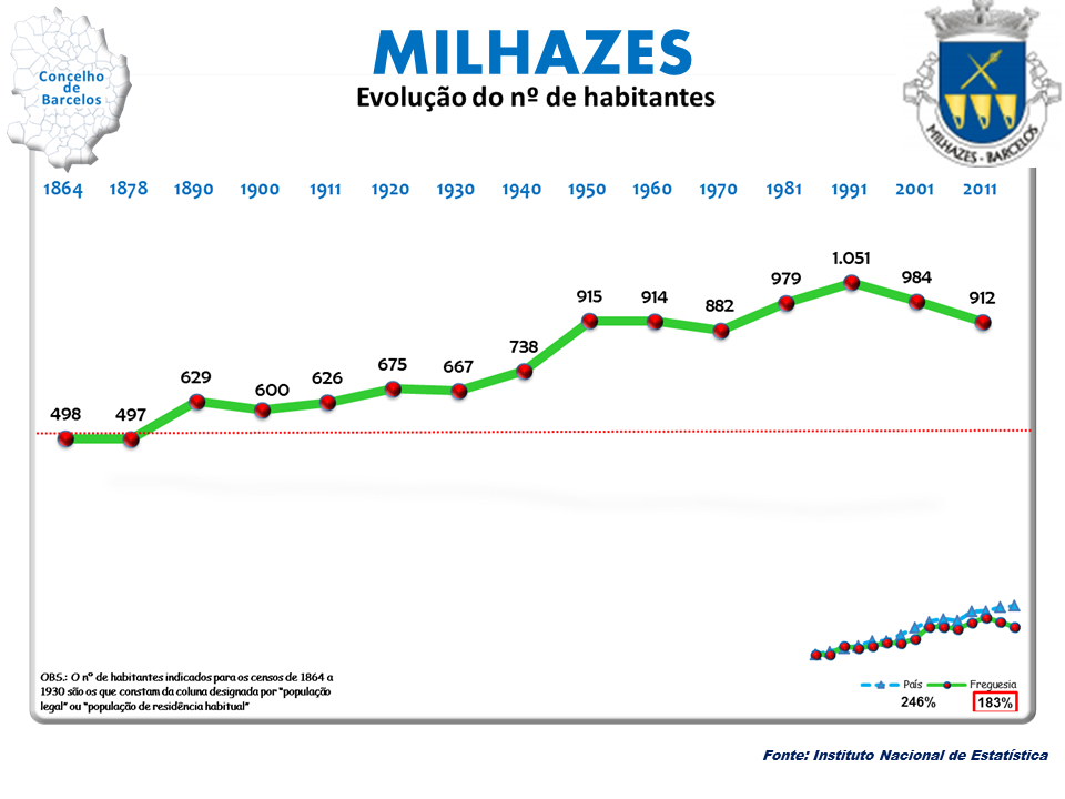 Cenos 1864/2011